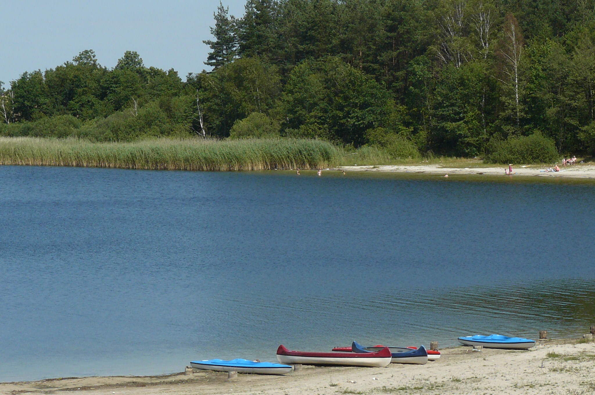 Jez. Płaczewo koło Starogardu Gd.